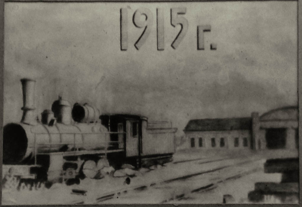 Паровозное депо станции Торговая, 1915 год. Фото со стенда музея Дома Культуры "Железнодорожник".